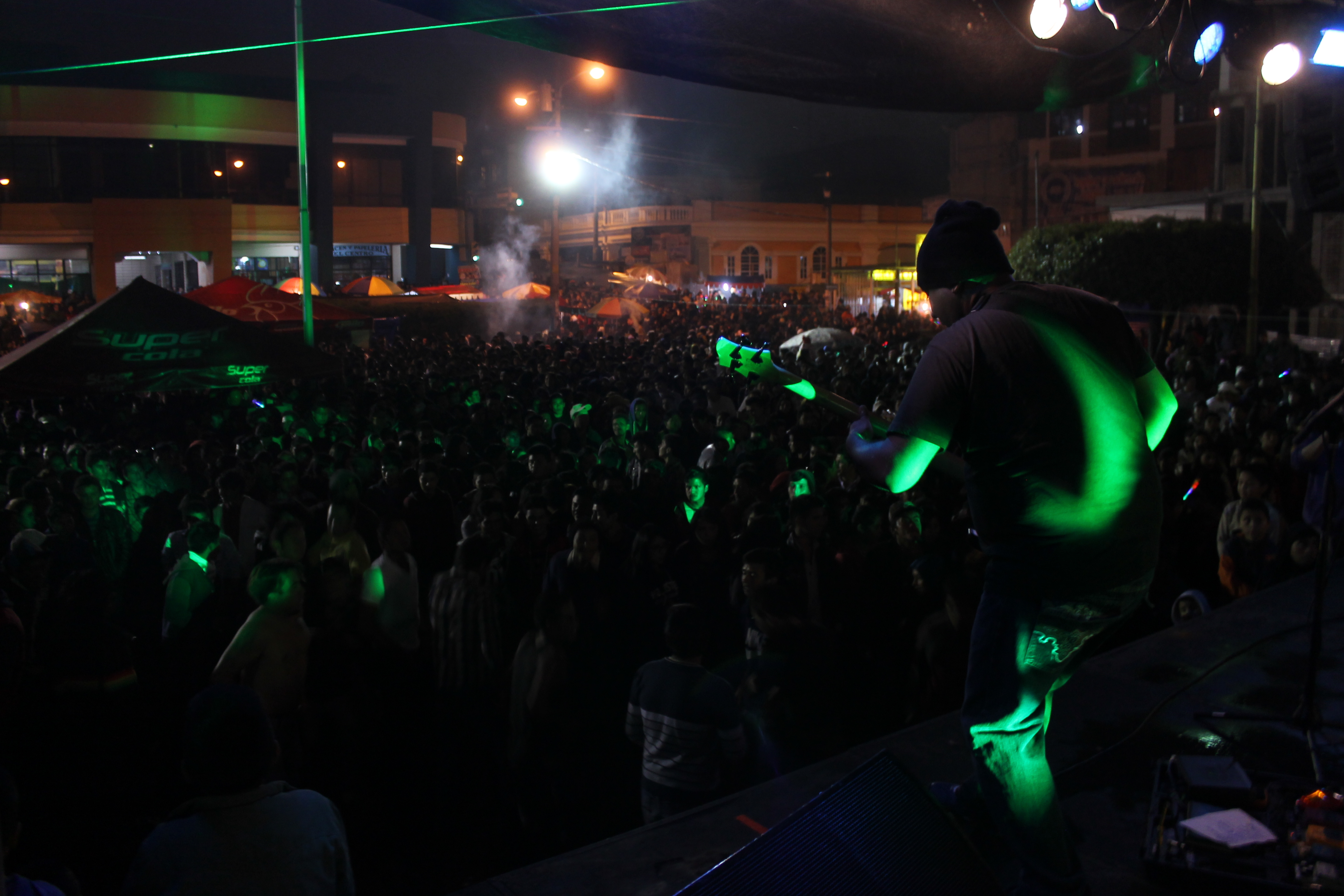 Dave Amado, bajista de Boomper en un concierto en el Árbol Gallo de San Marcos, noviembre 2015